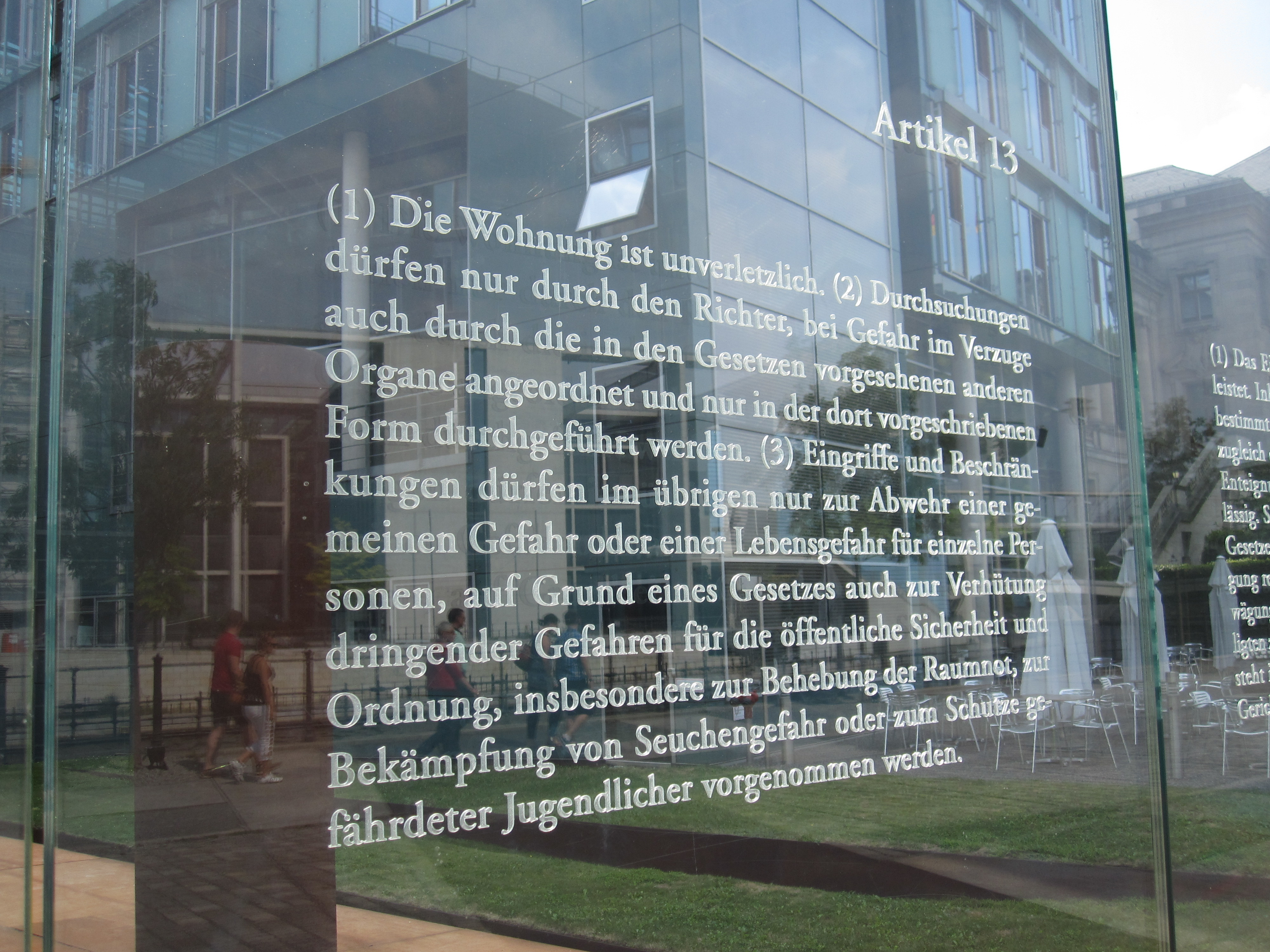 Bundestagsgebäude in Berlin: Der israelische Künstler Dani Karavan hat in drei Meter hohe Glasscheiben, die einen Außenhof des Jakob-Kaiser-Hauses im Uferbereich zur Spree begrenzen, die 19 Grundrechtsartikel des Grundgesetzes mit Laser eingraviert. „Die Grundrechtsartikel schweben gleichsam in Augenhöhe vor dem Haus der Fraktionen, dem Jakob-Kaiser-Haus“ (Andreas Kaernbach, Deutscher Bundestag).